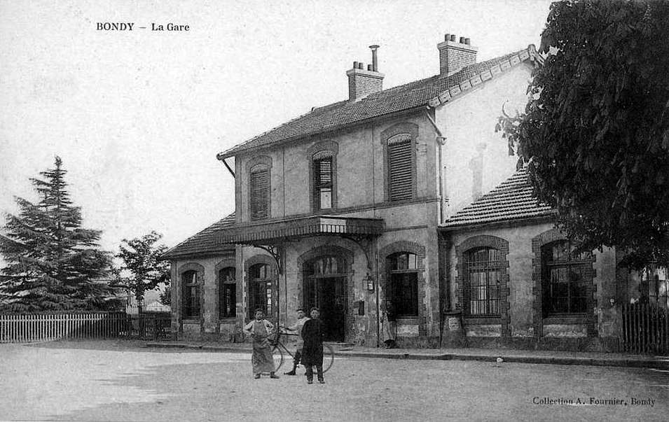 Le bâtiment voyageurs et l'entrée de la gare de Bondy vers 1900.